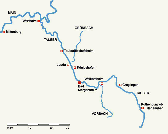 Karte des Verlaufs der Tauber